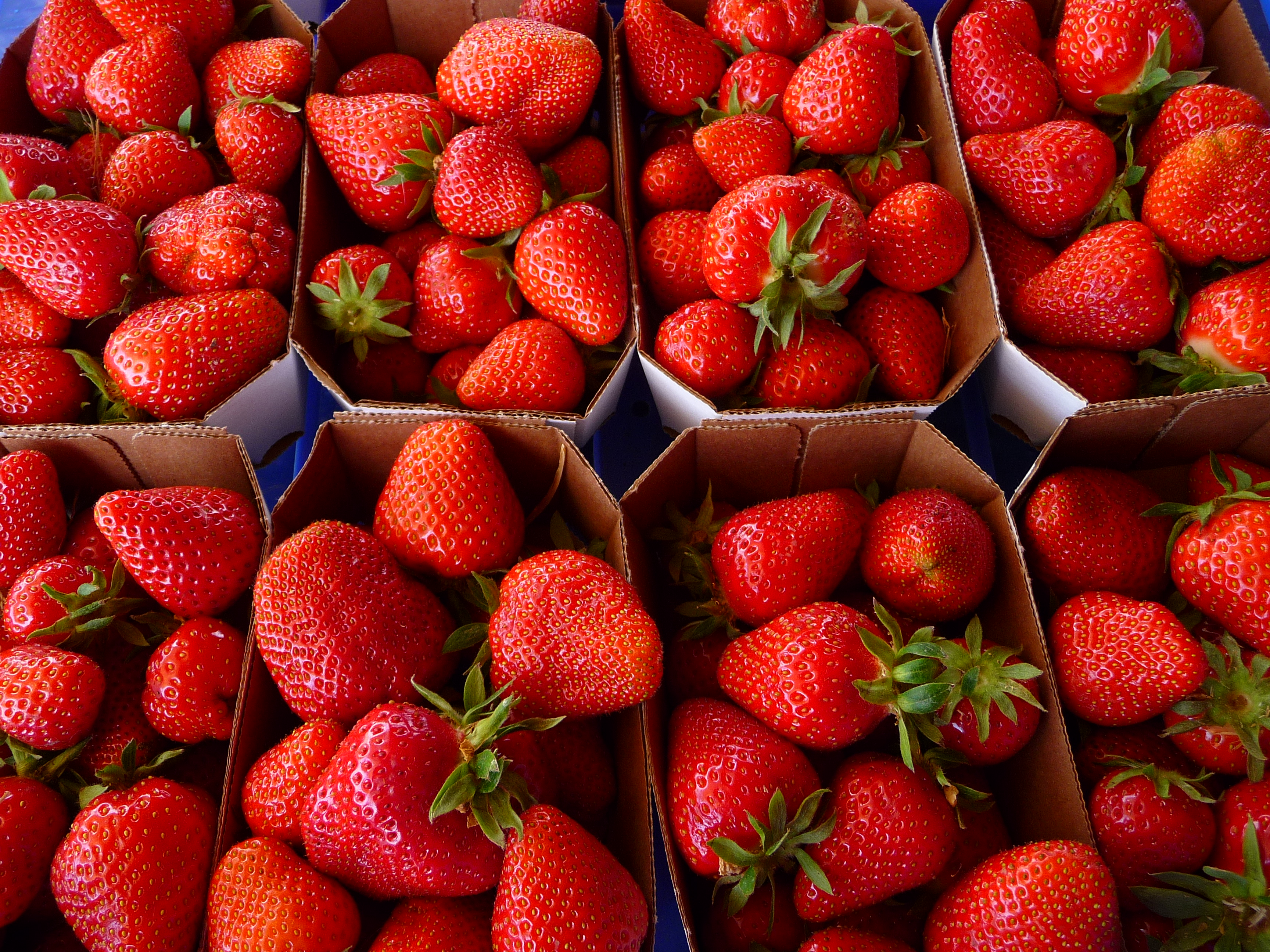 Gartenerdbeere Clery (Fragaria x ananassa), fotografiert in Heidelberg (Baden-Württemberg, Deutschland), eine robuste Garten-Erdbeer-Sorte mit festen, langkegeligen Beeren und angenehm süßem, kräftigem Aroma. Gut haltbar.